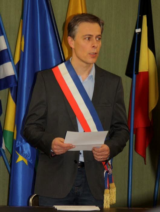 Maire St-Genest-Malifaux (mars 2014) et professeur de sciences économiques et sociales au lycée Saint Paul à Saint Étienne